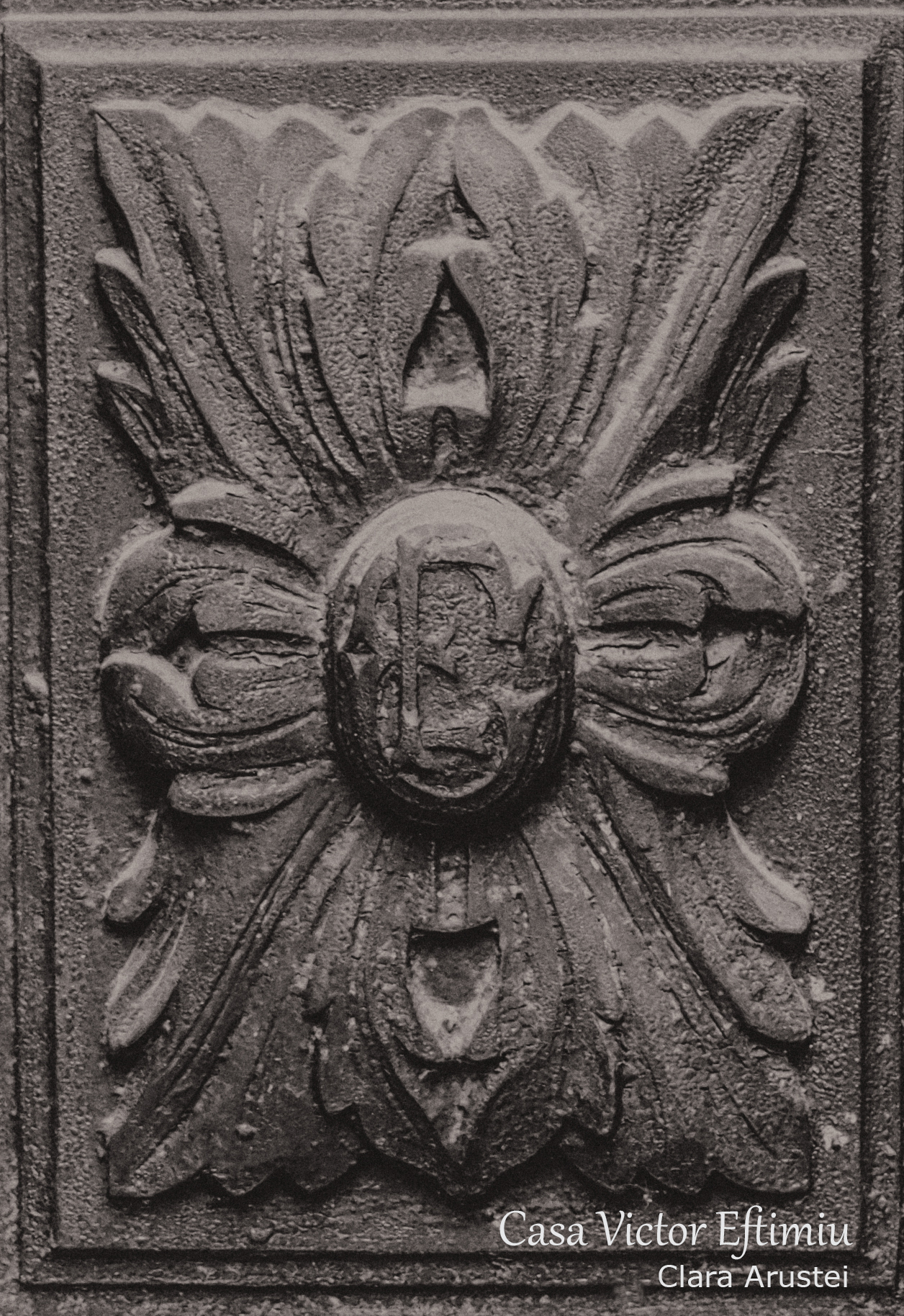 Casa Eftimiu Ivanescu - detaliu interior, usa cu initialele G.E. (Gheorghe Eftimiu, tatăl scriitorului Victor Eftimiu)